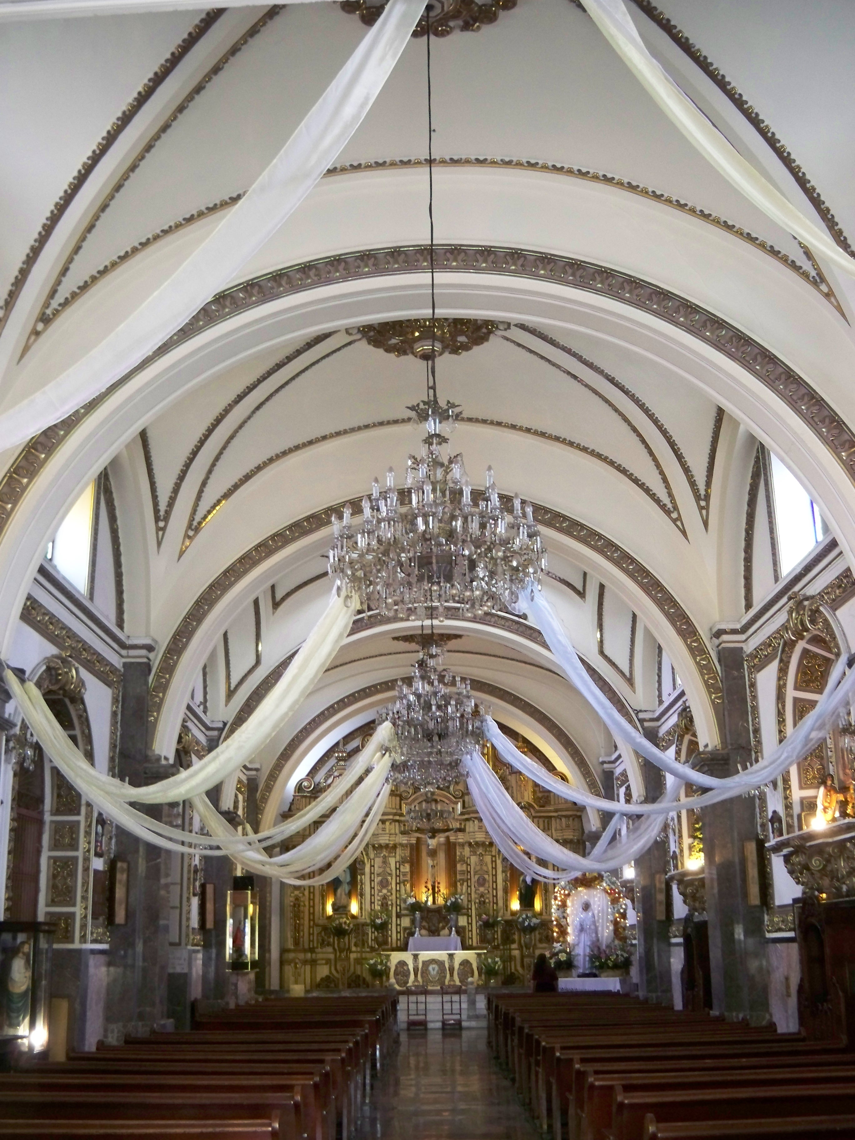 Parroquia de Santa Ana. Interior del templo (nave principal). Matamoros y Peralvillo, colonia Morelos (Tepito).